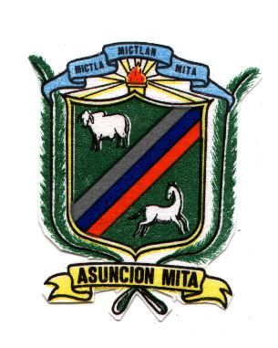 escudo as. mita